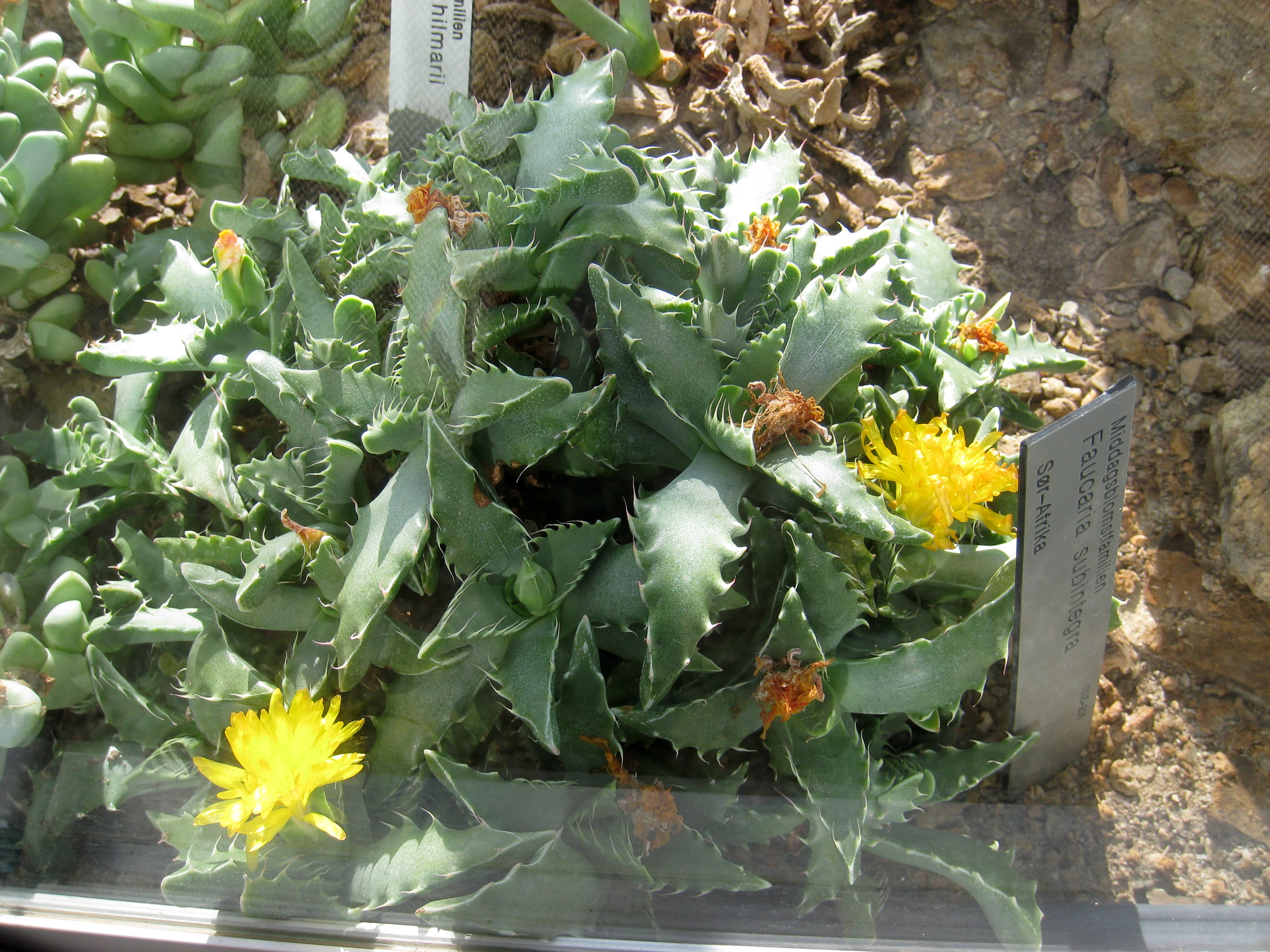 Faucaria subintegra, Oslo Botanical Garden, Oslo, Norway.